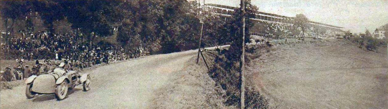 William Grover-Williams au Grand Prix de l'A.C.F. Sport de 1928, vainqueur au circuit du Comminges.